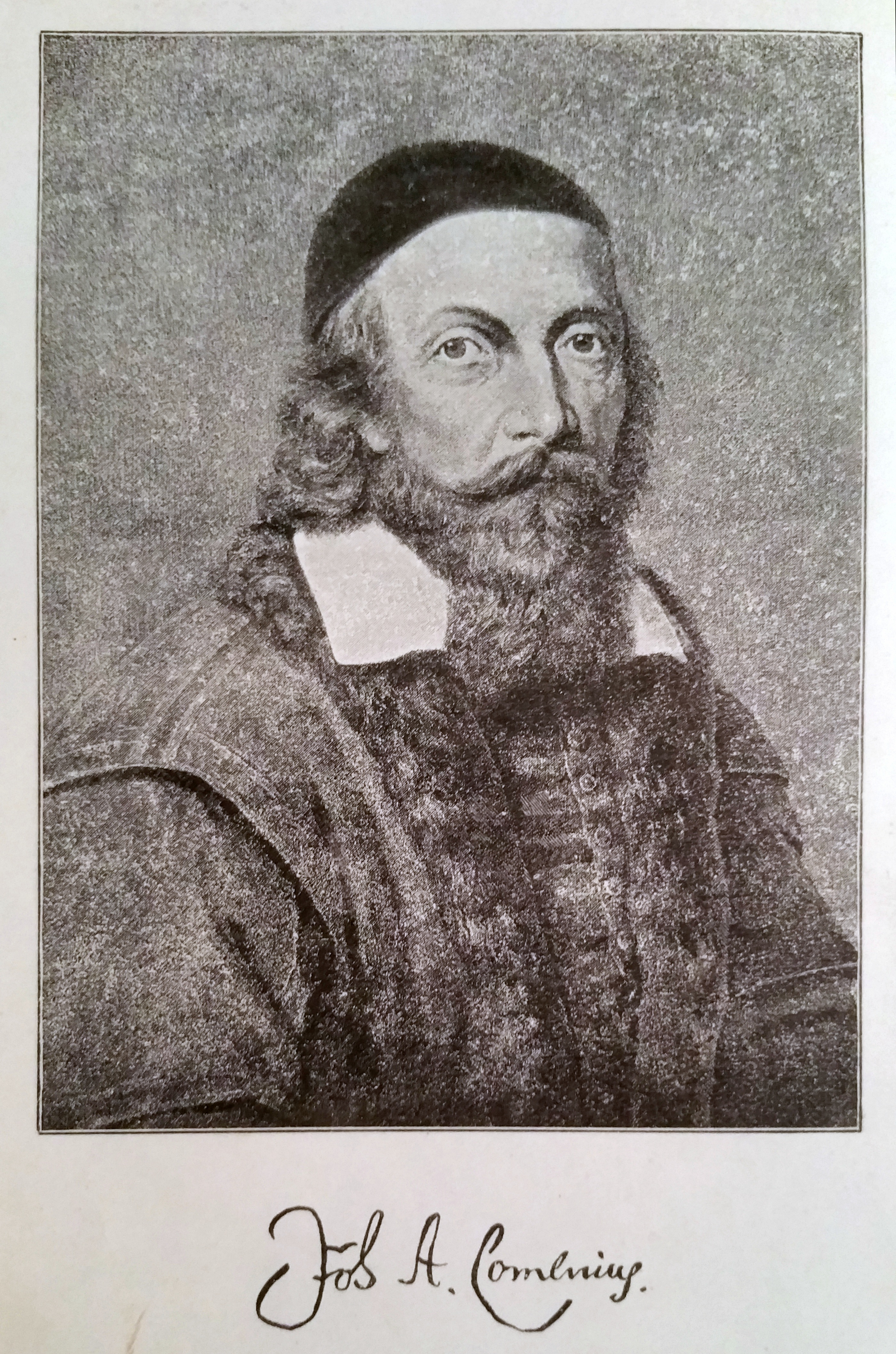 Johannes A. Comenius aus "Didactica magna", Paderborn 1913